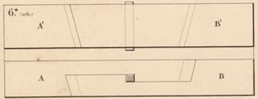 Trait de Jupiter à joint droit avec une seule clé. Ses abouts sont en coupes inverses. C'est un assemblage très solide. Illustration issue de la planche XXII. Des commentaires sur ces assemblages sont disponibles dans Traité de la Charpenterie, Vol. 1 A-R Emy, pp. 279-281.